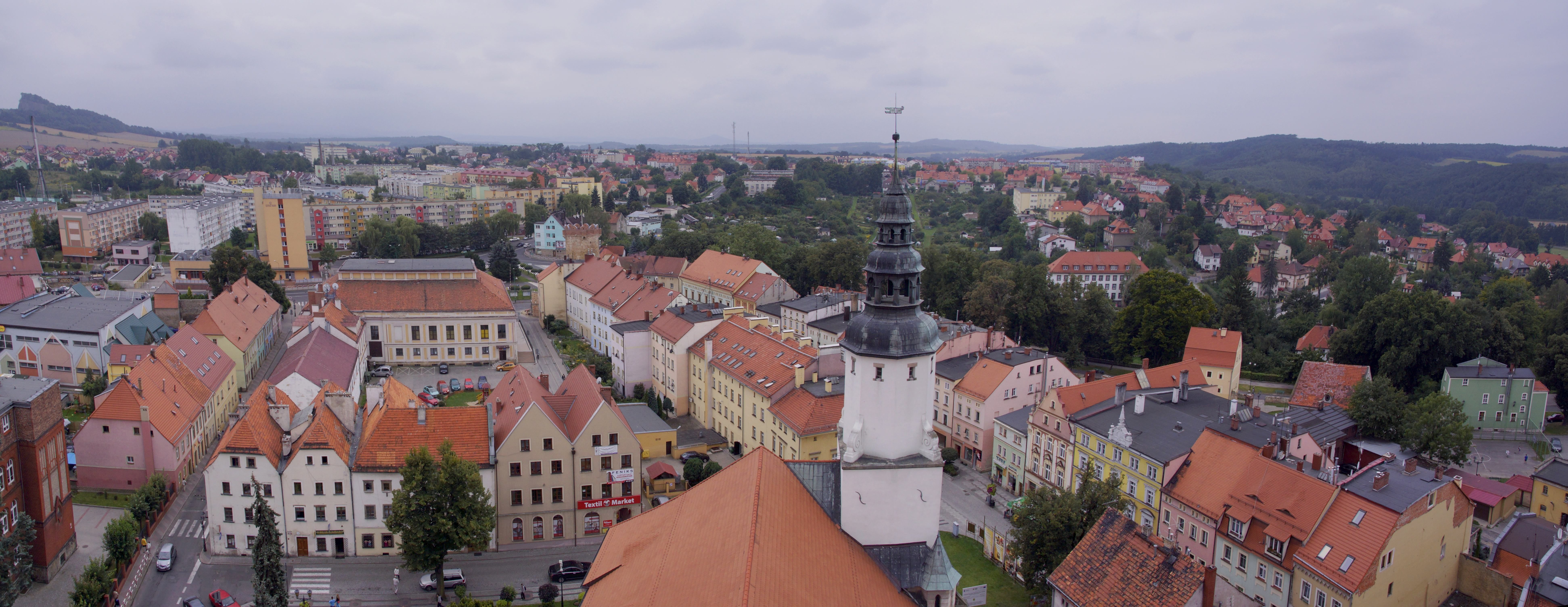 Stare Miasto, widok z wieży Kościoła Narodzenia NMP Złotoryja, Złotoryja 12.1958.